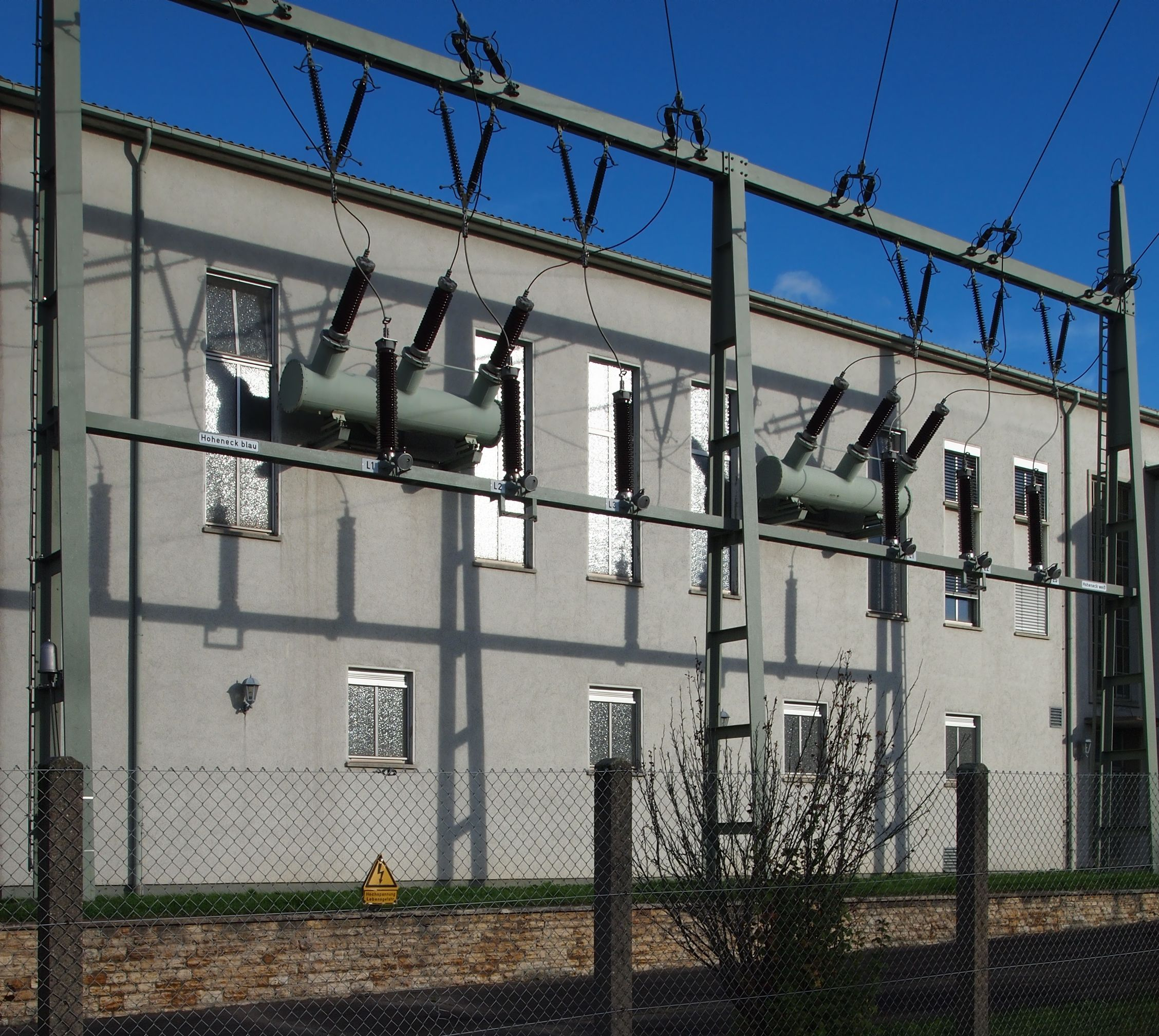 Kabelendverschlüsse an der Außenwand des 110-kV-Umspannwerks Fellbach